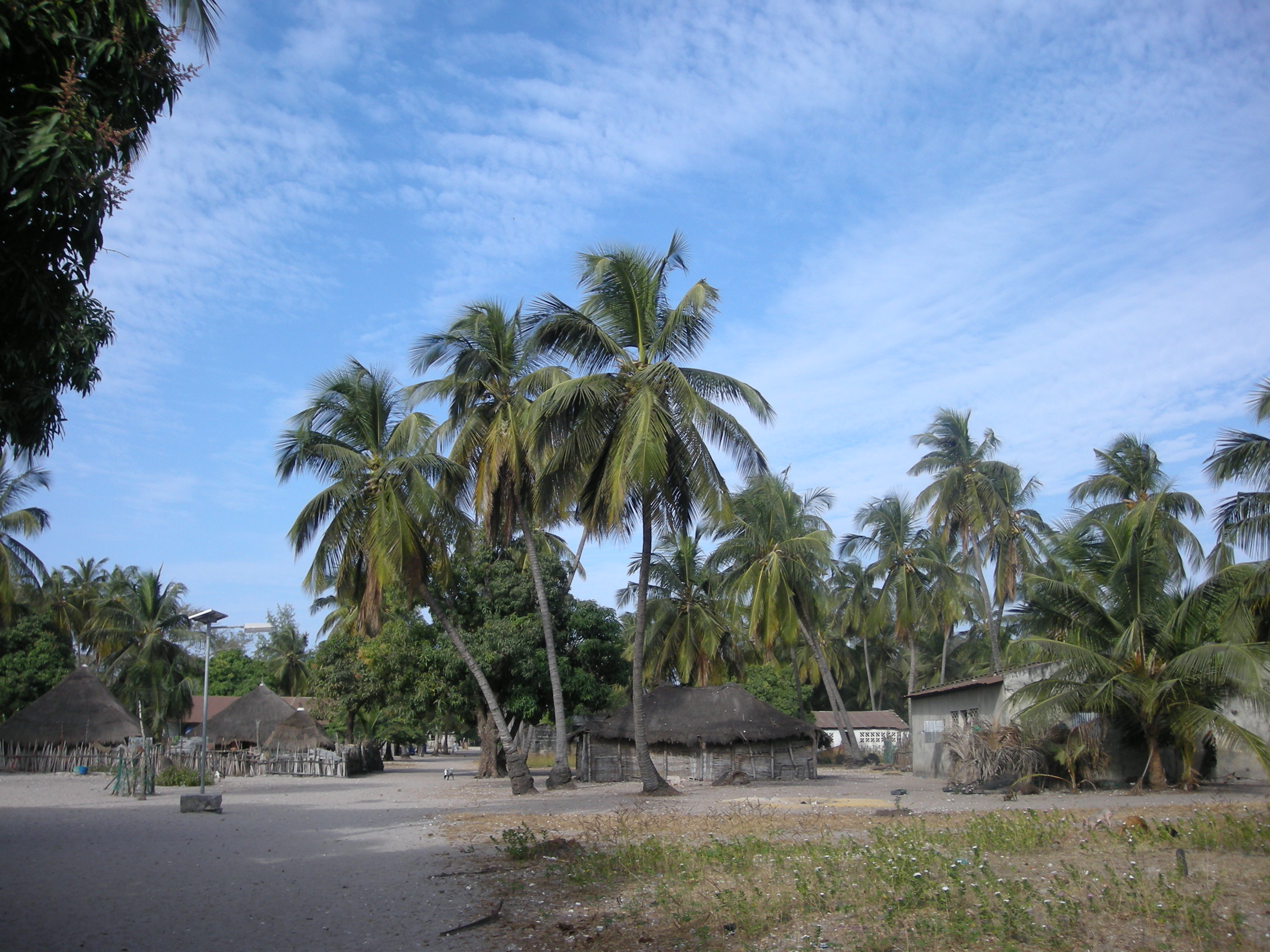 Eclairage public solaire le long de larges allées à Carabane (Casamance, Sénégal)